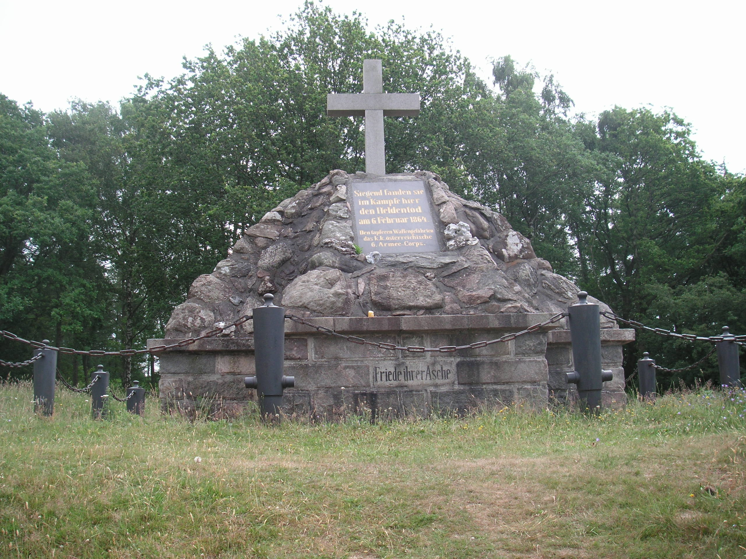 Österreicher Denkmal in Oeversee an eine Schlacht im Deutsch-Dänischen Krieg